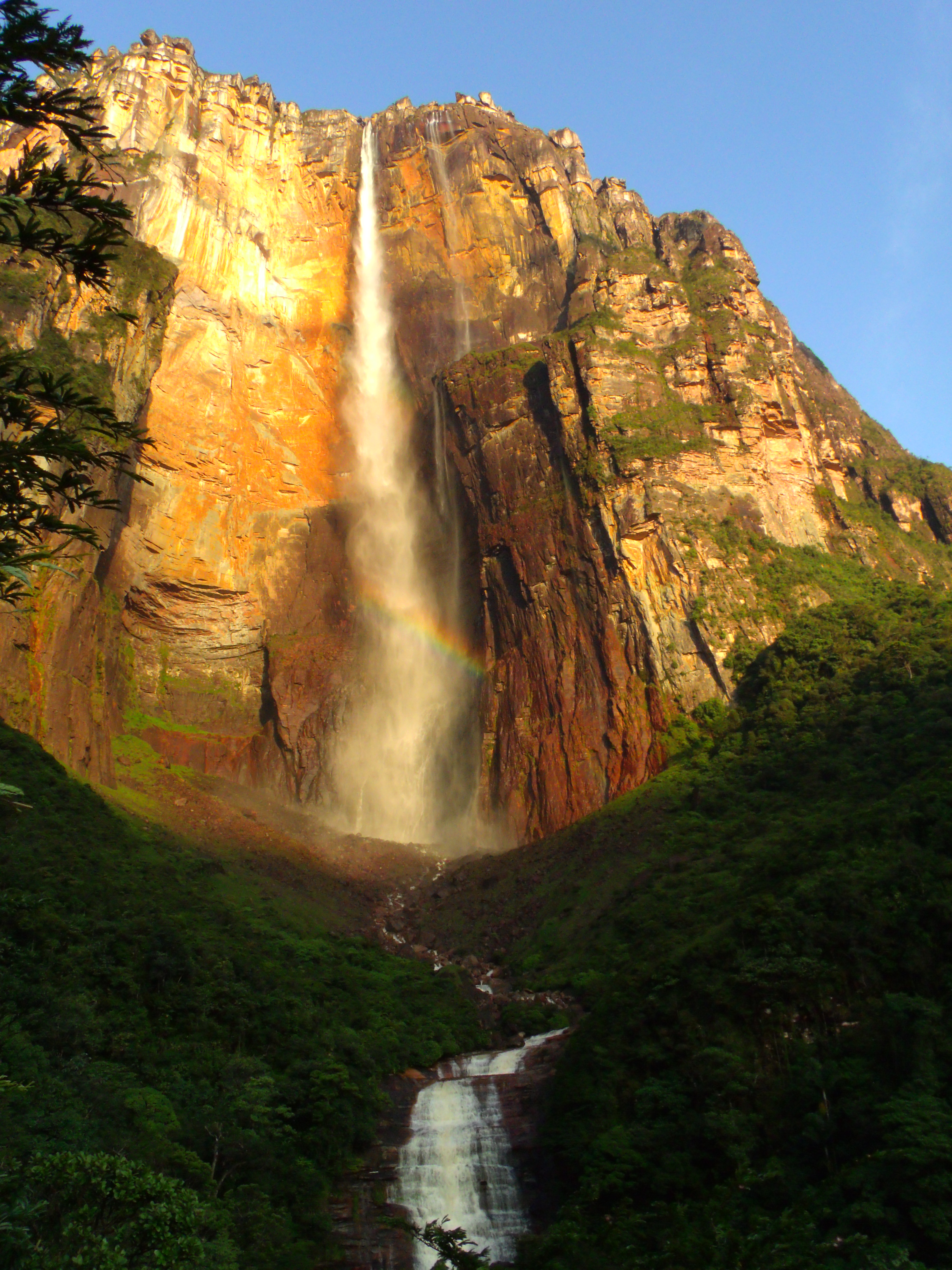 Caída de agua Salto Ángel. Canaima, Venezuela.